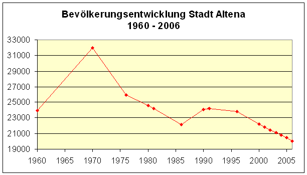 Bevölkerungsentwicklung Stadt Altena 1960 - 2006